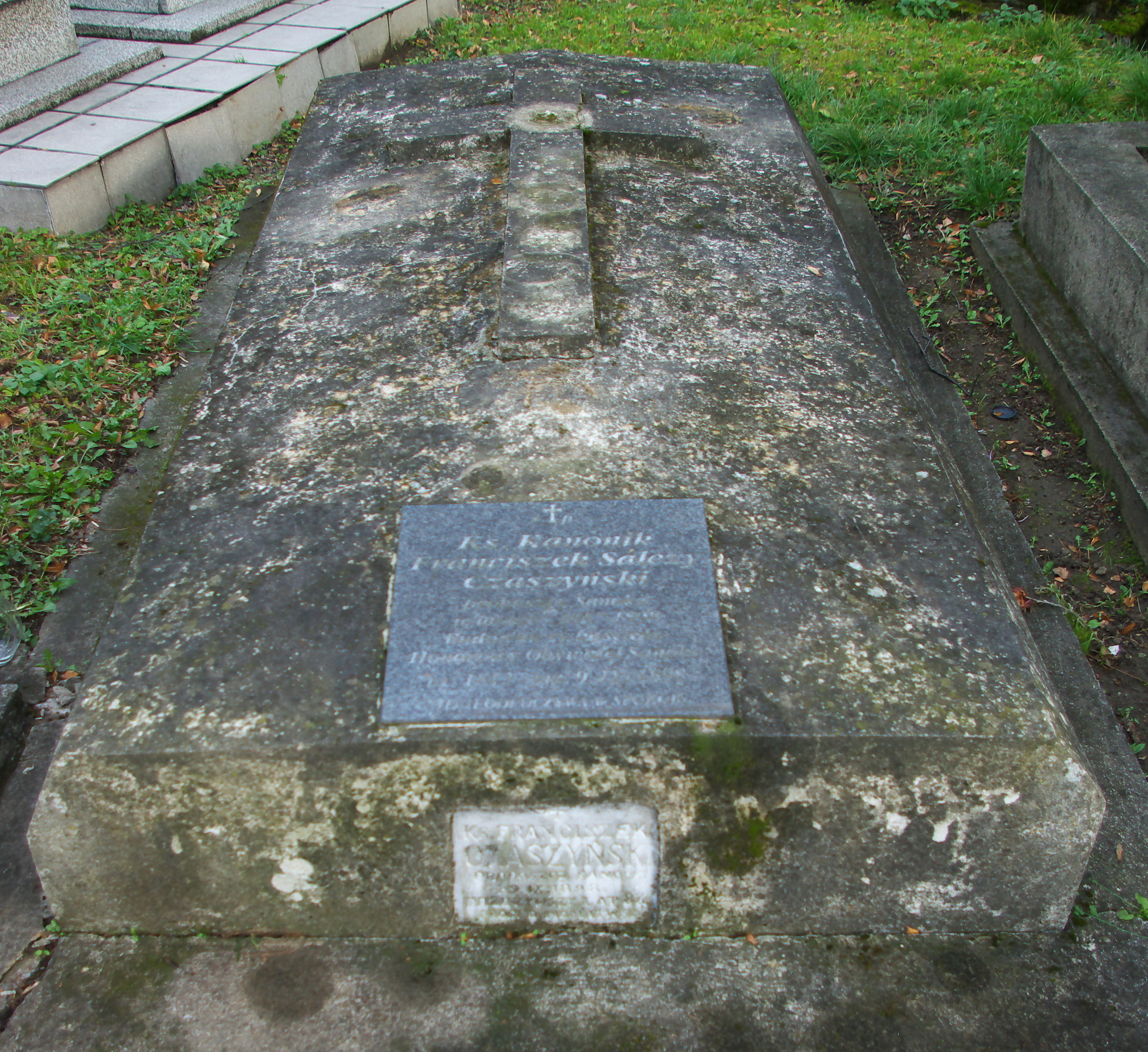 Grób Franciszka Salezego Czaszyńskiego w części Matejki Cmentarza Centralnego w Sanoku